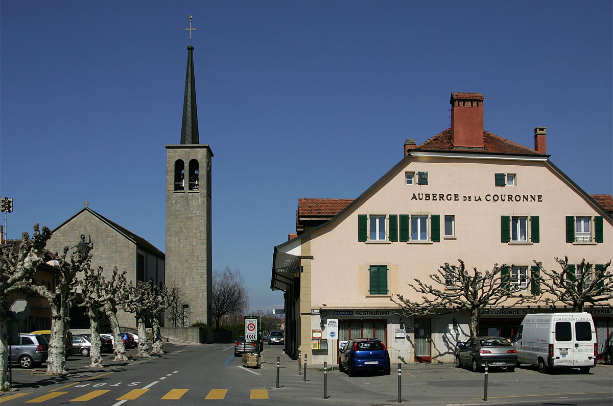 Die katholische Kirche St.Jean von Echallens